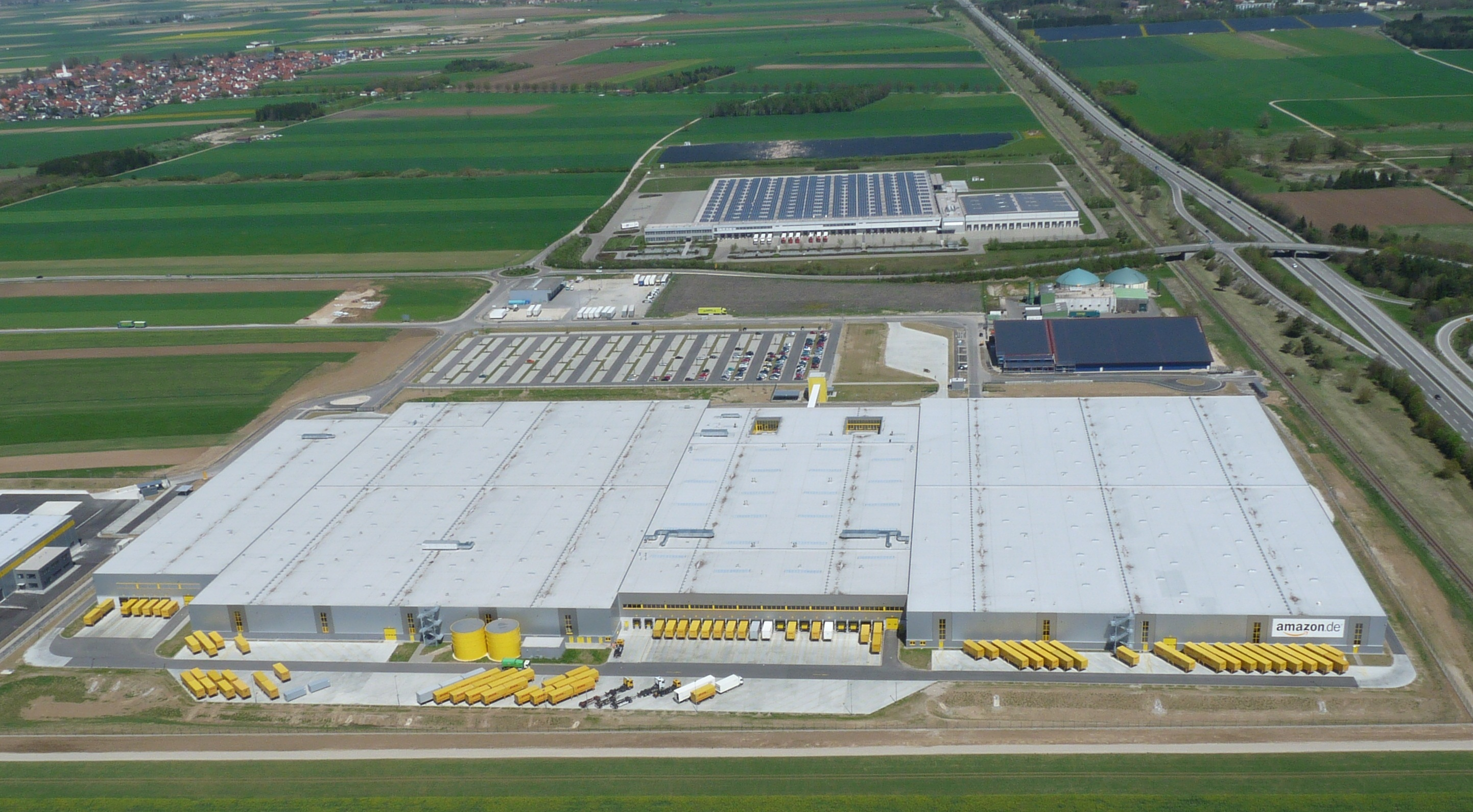 Amazon.de 1204